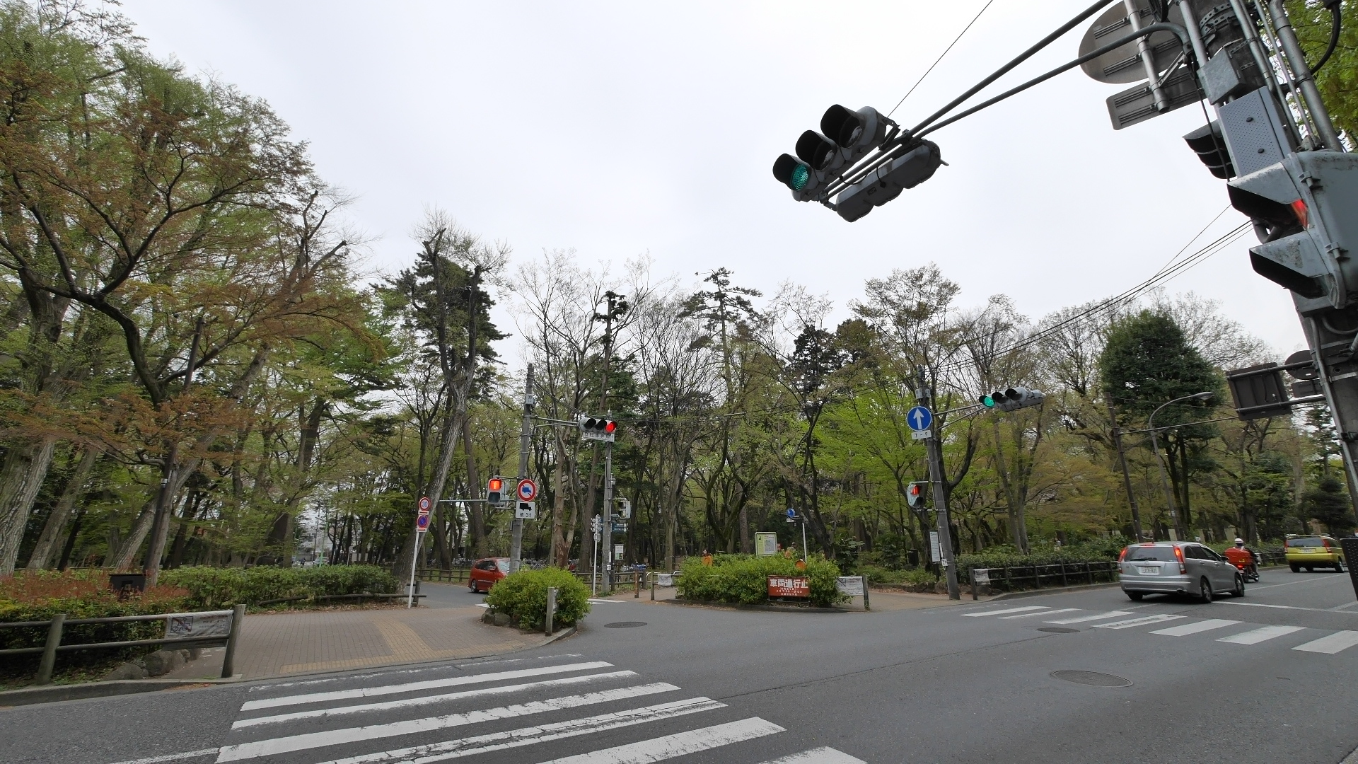 1 Chome Gotenyama, Musashino-shi, Tōkyō-to 180-0005, Japan